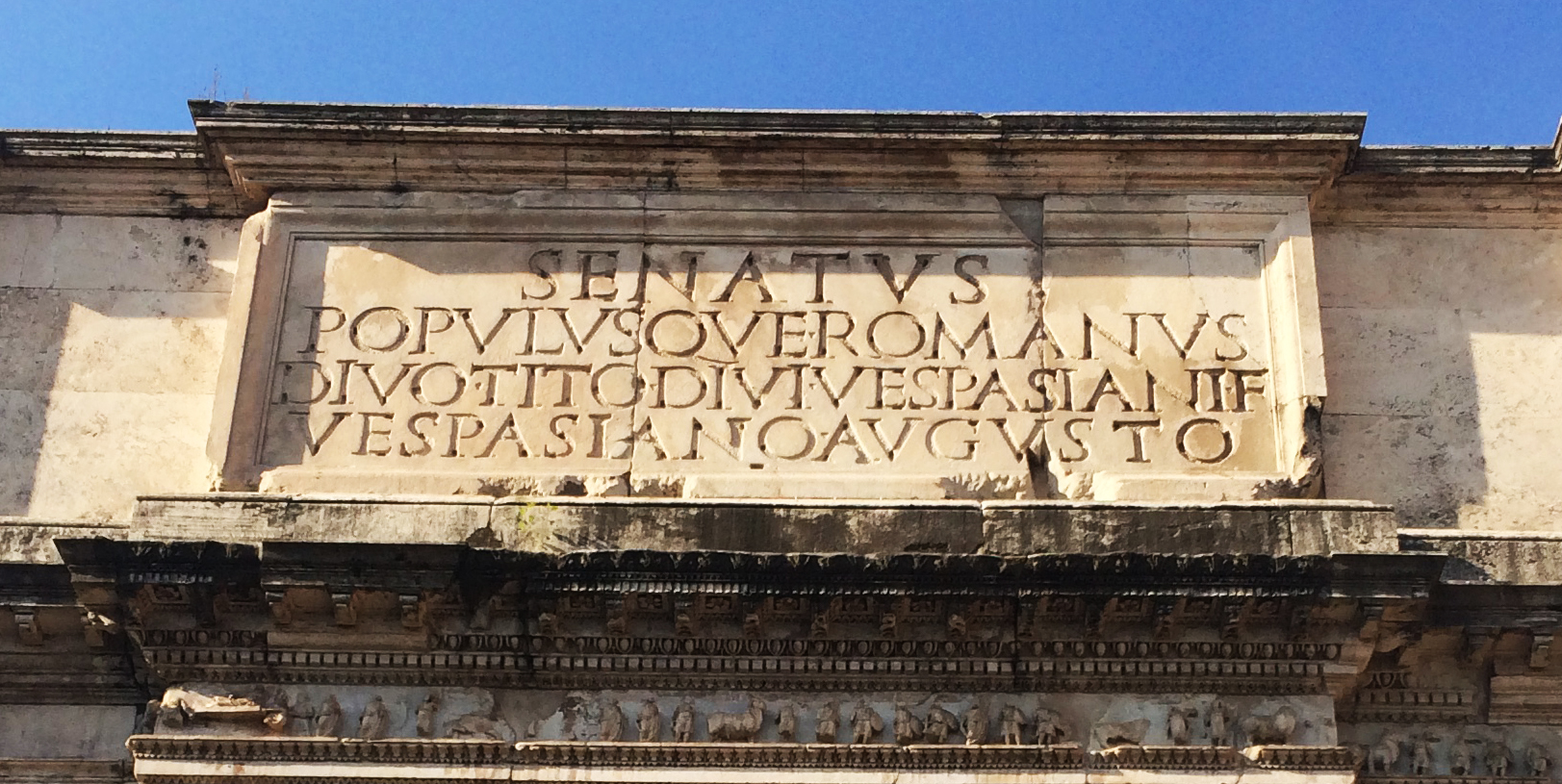 Les inscriptions de l' arc de Titus